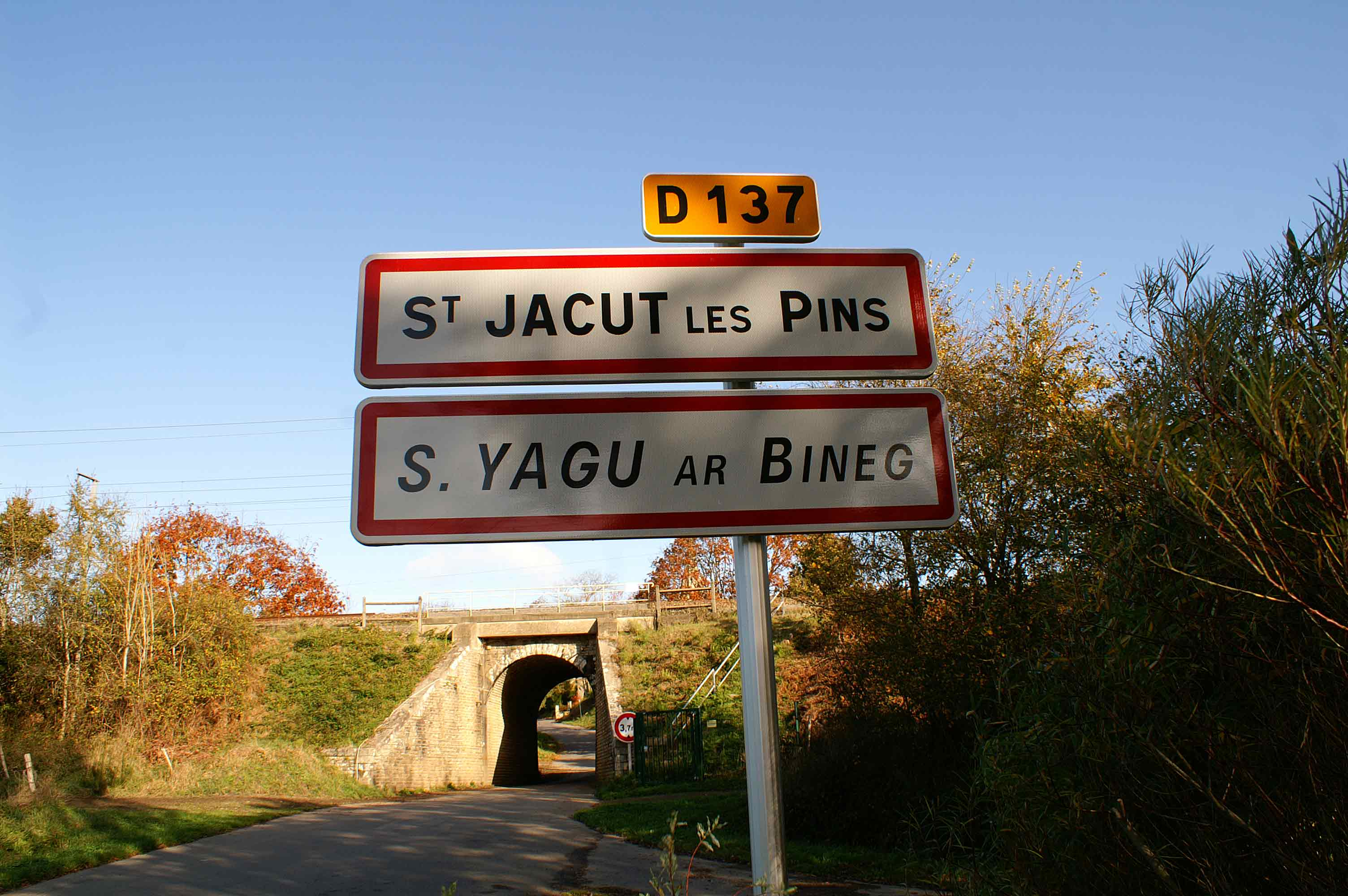 Panneau bilingue de Saint-Jacut-les-Pins et pont ferroviaire sur la départementale 137, ou devait se trouver le point d'arrêt SNCF avant sa fermeture.